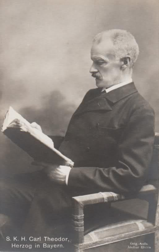 Herzog Karl Theodor in Bayern, 1901.